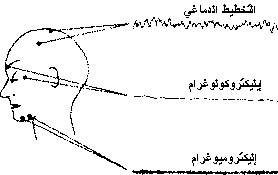 EEG, EOG, and EMG